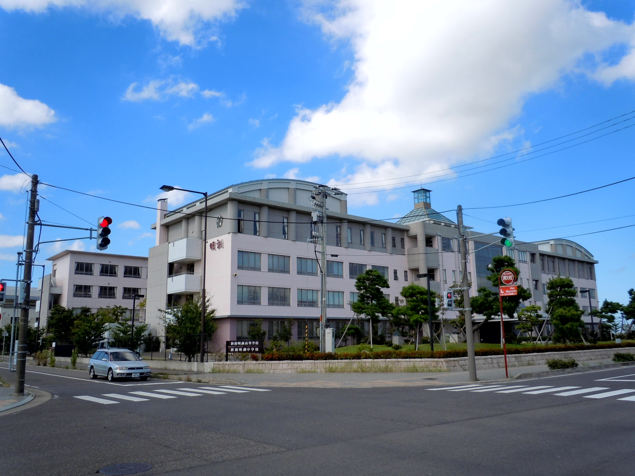 新潟明訓高等学校・中学校